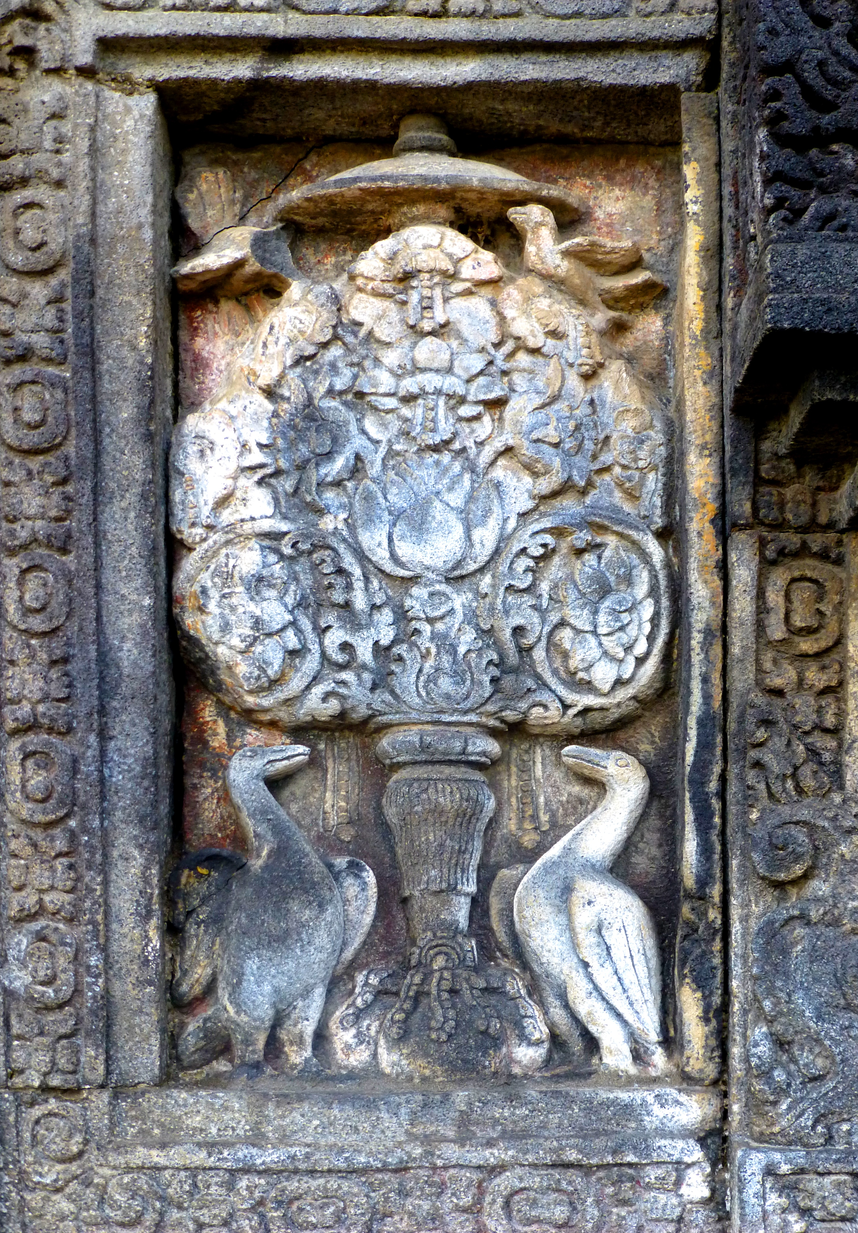 046 Kalpataru and Geese, Siva Temple, Prambanan, Central Java Photograph from Prambanan temple compound near Yogyakarta in Java, Indonesia taken by Anandajoti.